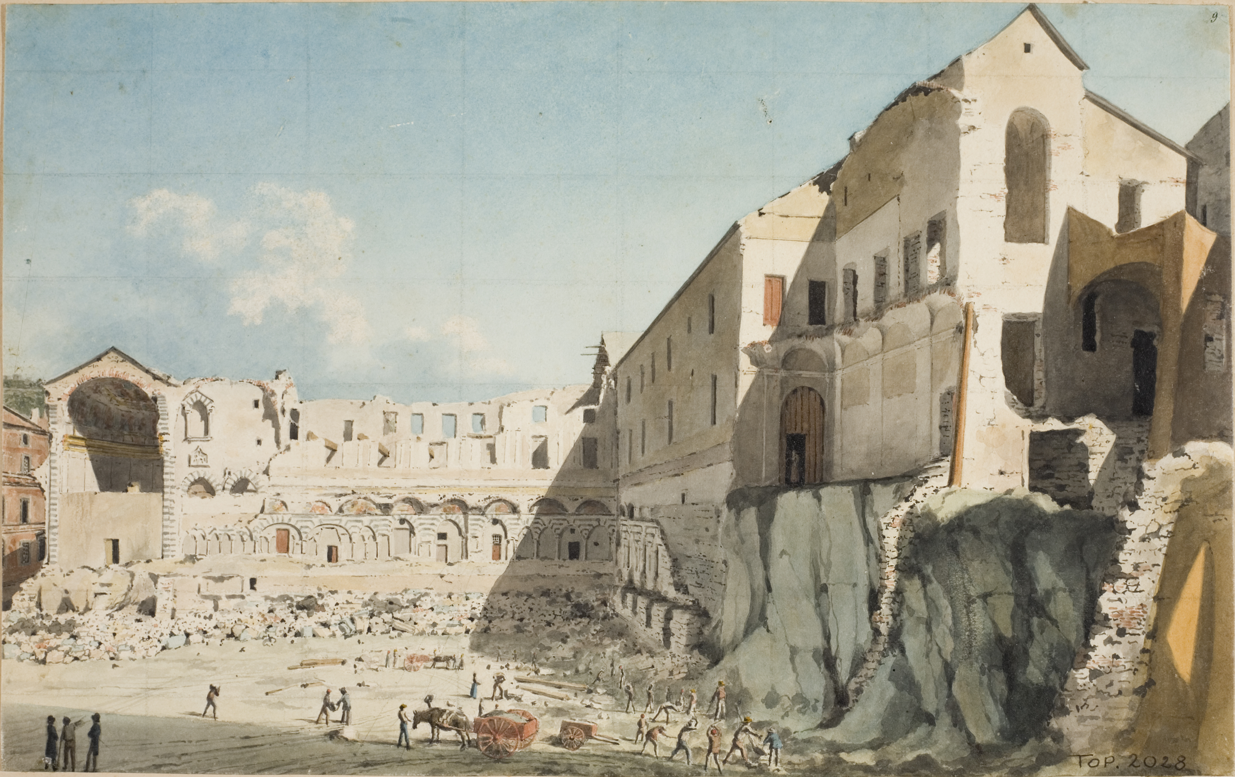 L'acquarello rappresenta la demolizione della chiesa di San Domenico a Genova